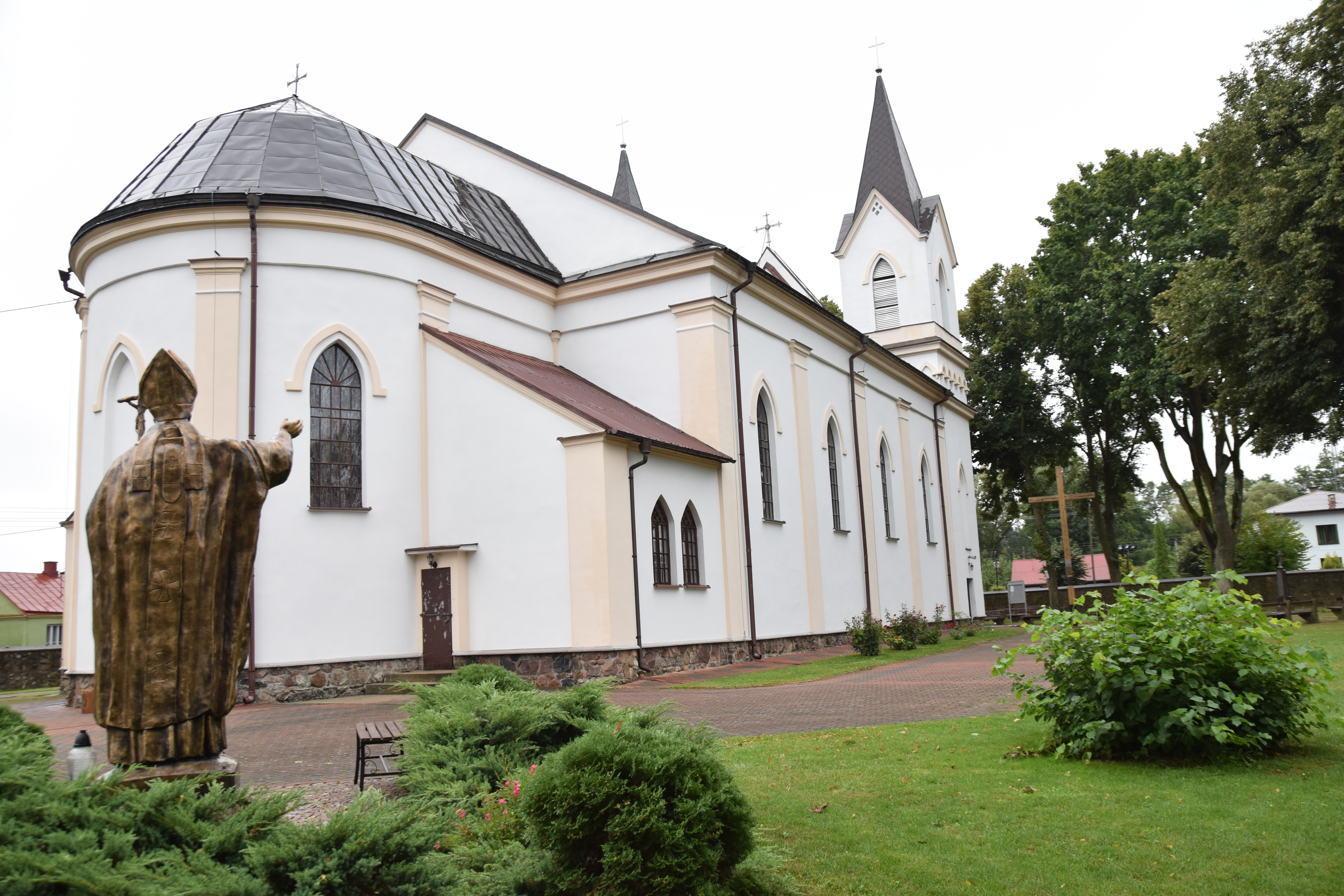 Kościół pw. Opatrzności Bożej w Kuźnicy z zewnątrz podczas deszczowej niedzieli.